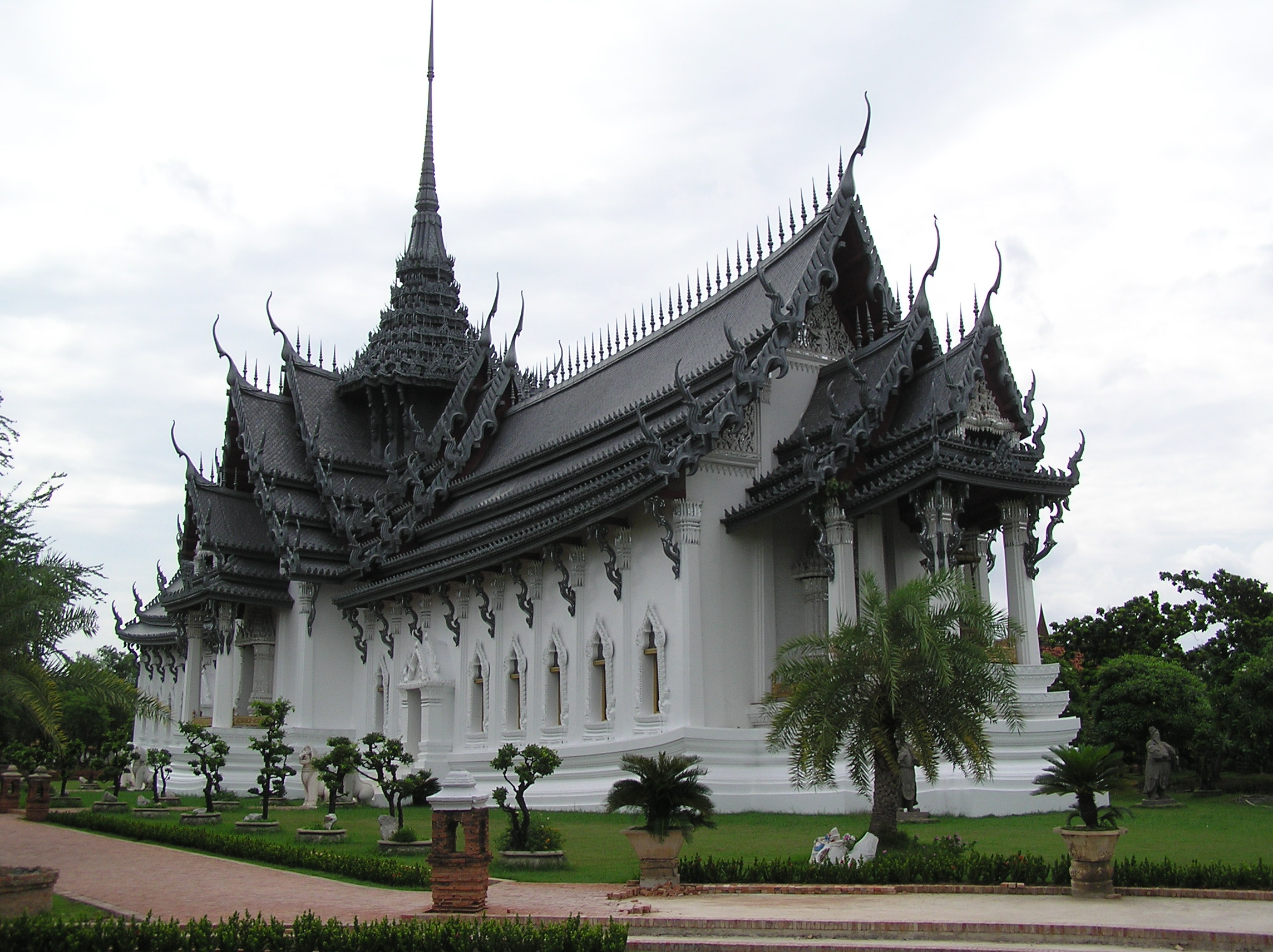 Sanphet Prasat Throne Hall, Ayuthayan kings' palace, replica in Muang Boran